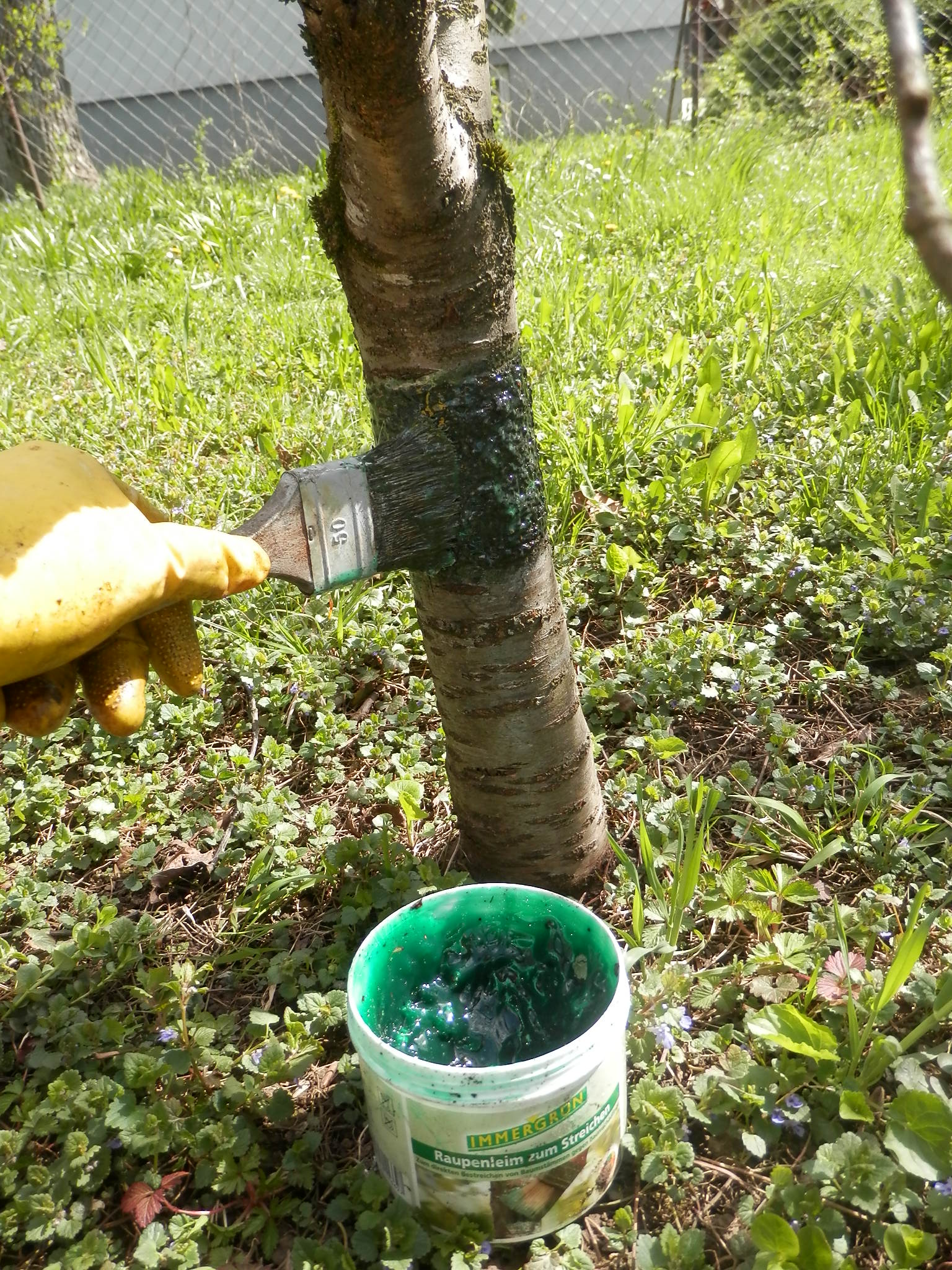 Aufstreichen eines Raupenleimes an einem Weichselbaum im Frühling. Damit soll verhindert werden, das Ameisen Blattläuse zu den neuen Austrieben bringen. Foto erstellt in einem Garten in der Stadt Leibnitz (Steiermark)